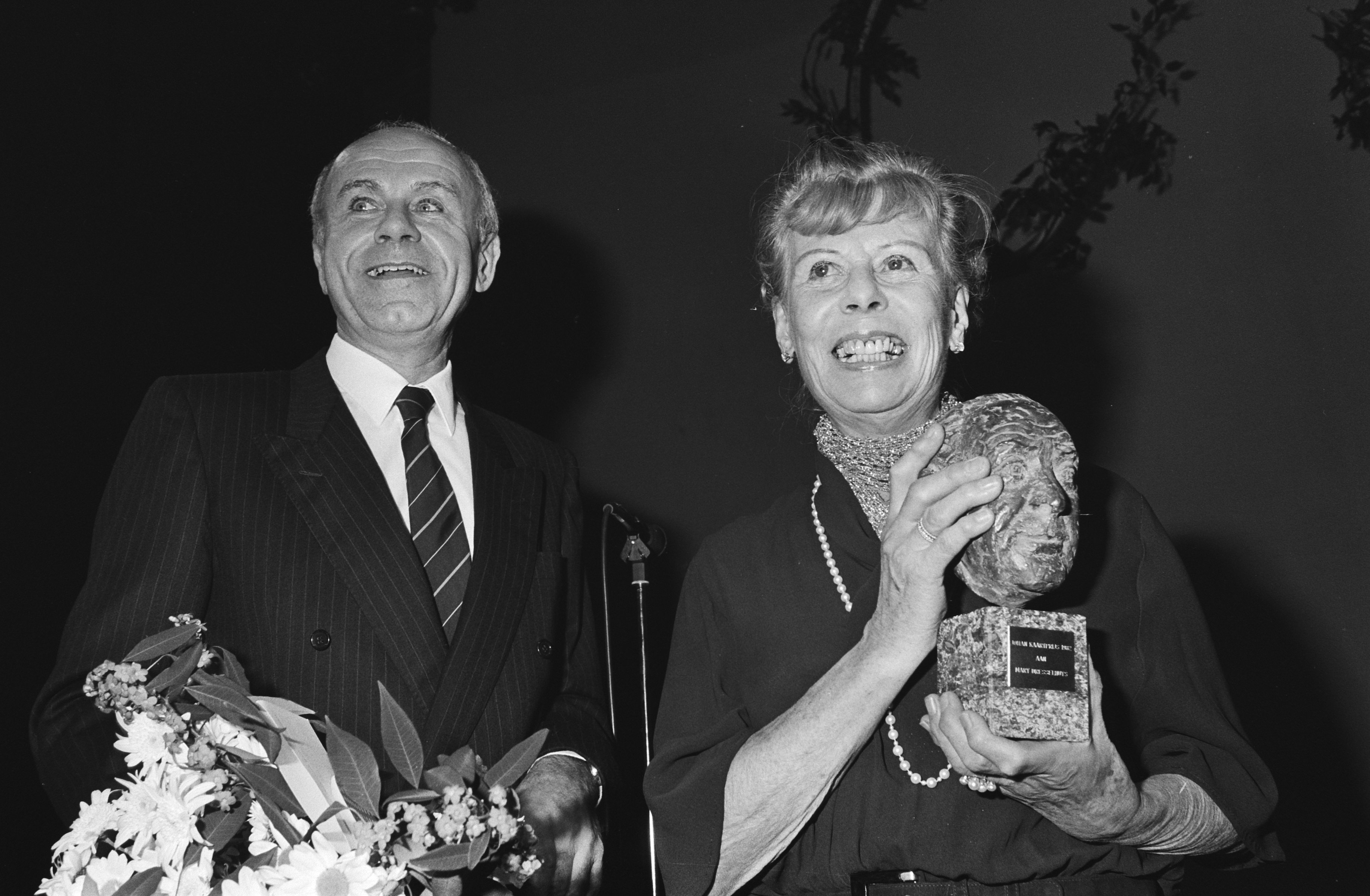 Collectie / Archief : Fotocollectie Anefo Reportage / Serie : Uitreiking Johan Kaart Prijs aan Mary Dresselhuys Beschrijving : prijsuitreikingen, acteurs, theaterprijzen Datum : 1 december 1982 Trefwoorden : acteurs, prijsuitreikingen, theaterprijzen Persoonsnaam : Dresselhuys, Mary Fotograaf : Antonisse, Marcel / Anefo Auteursrechthebbende : Nationaal Archief Materiaalsoort : Negatief (zwart/wit) Nummer archiefinventaris : bekijk toegang 2.24.01.05 Bestanddeelnummer : 932-4234